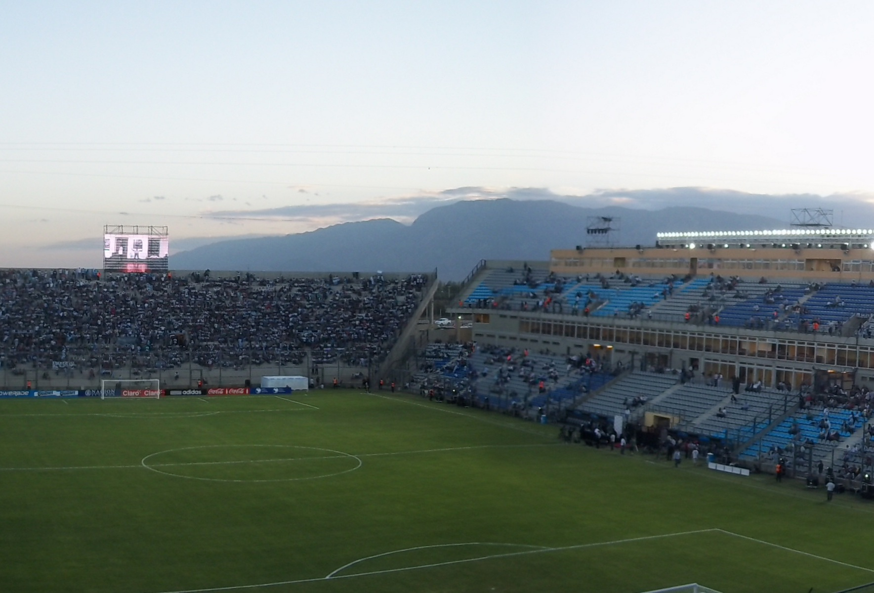 Estadio único San Juan del Bicentenario, departamento Pocito, provincia de San Juan, Argentina.